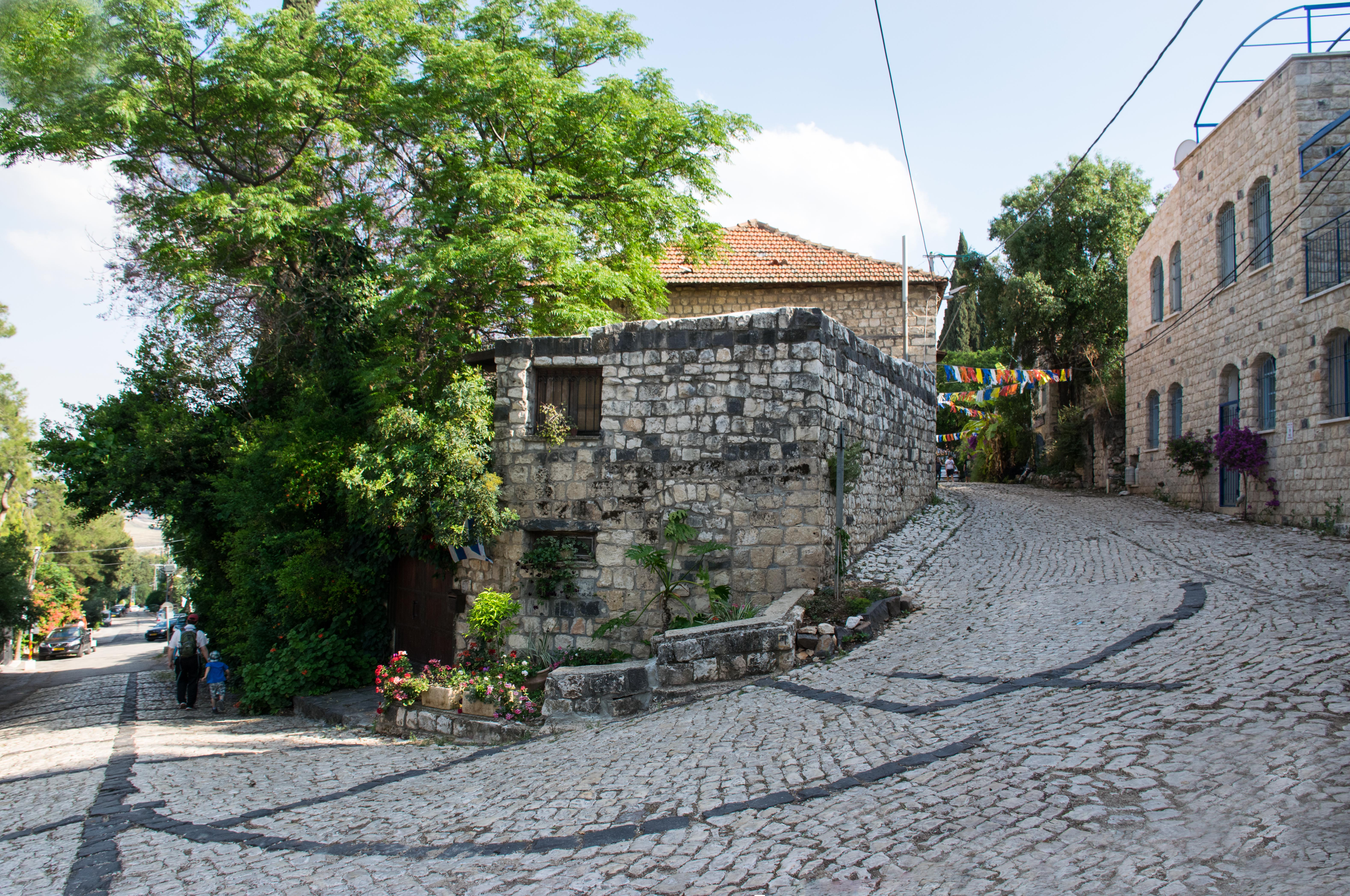 DSC_3321-Edit.jpg Rosh Pina